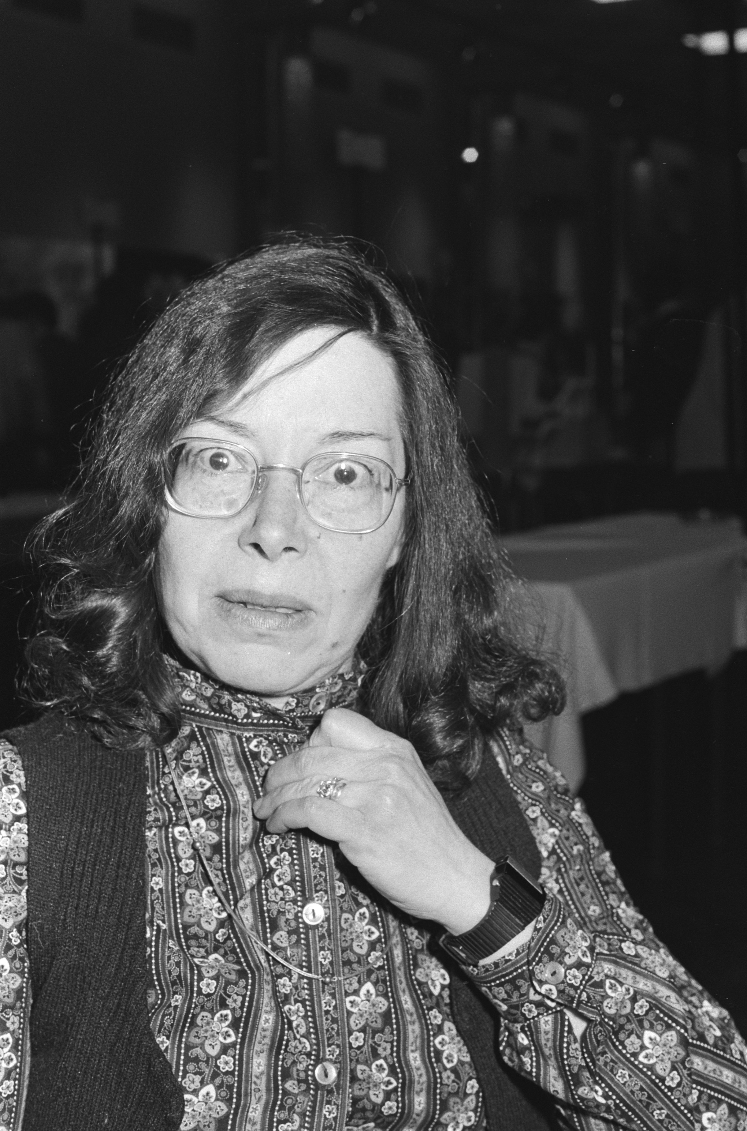 Collectie / Archief : Fotocollectie Anefo Reportage / Serie : Persconferentie i.v.m. de Boekenweek 1979 in Amsterdam Beschrijving : De schrijfster Ethel Portnoy Datum : 5 maart 1979 Locatie : Amsterdam, Noord-Holland Trefwoorden : boekenweken, persconferenties, portretten, schrijvers Persoonsnaam : Portnoy, Ethel Fotograaf : Dijk, Hans van / Anefo Auteursrechthebbende : Nationaal Archief Materiaalsoort : Negatief (zwart/wit) Nummer archiefinventaris : bekijk toegang 2.24.01.05 Bestanddeelnummer : 930-1544